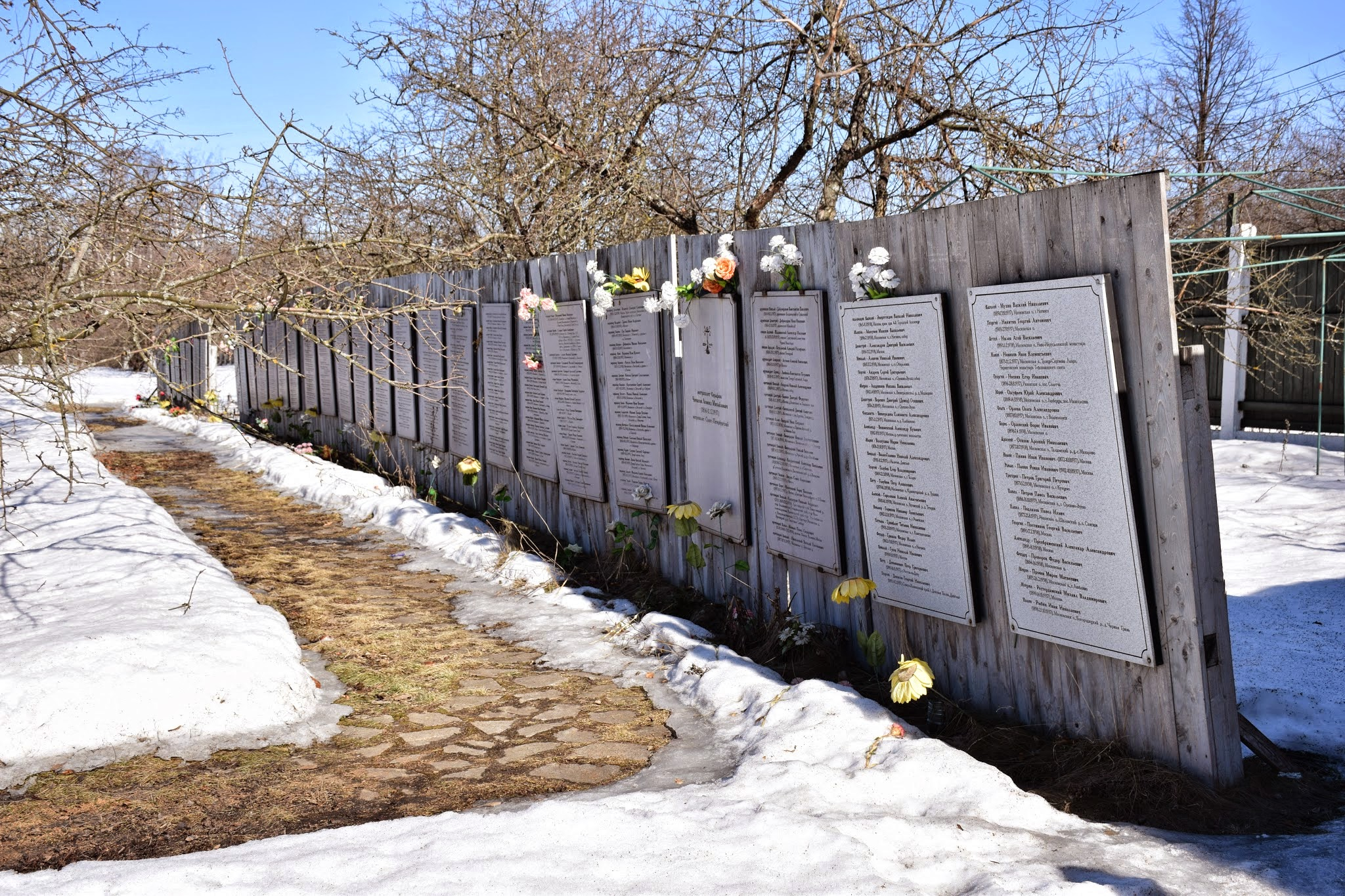 Бутовский полигон: Юбилейная улица, Дрожжино, Ленинский район, Московская область